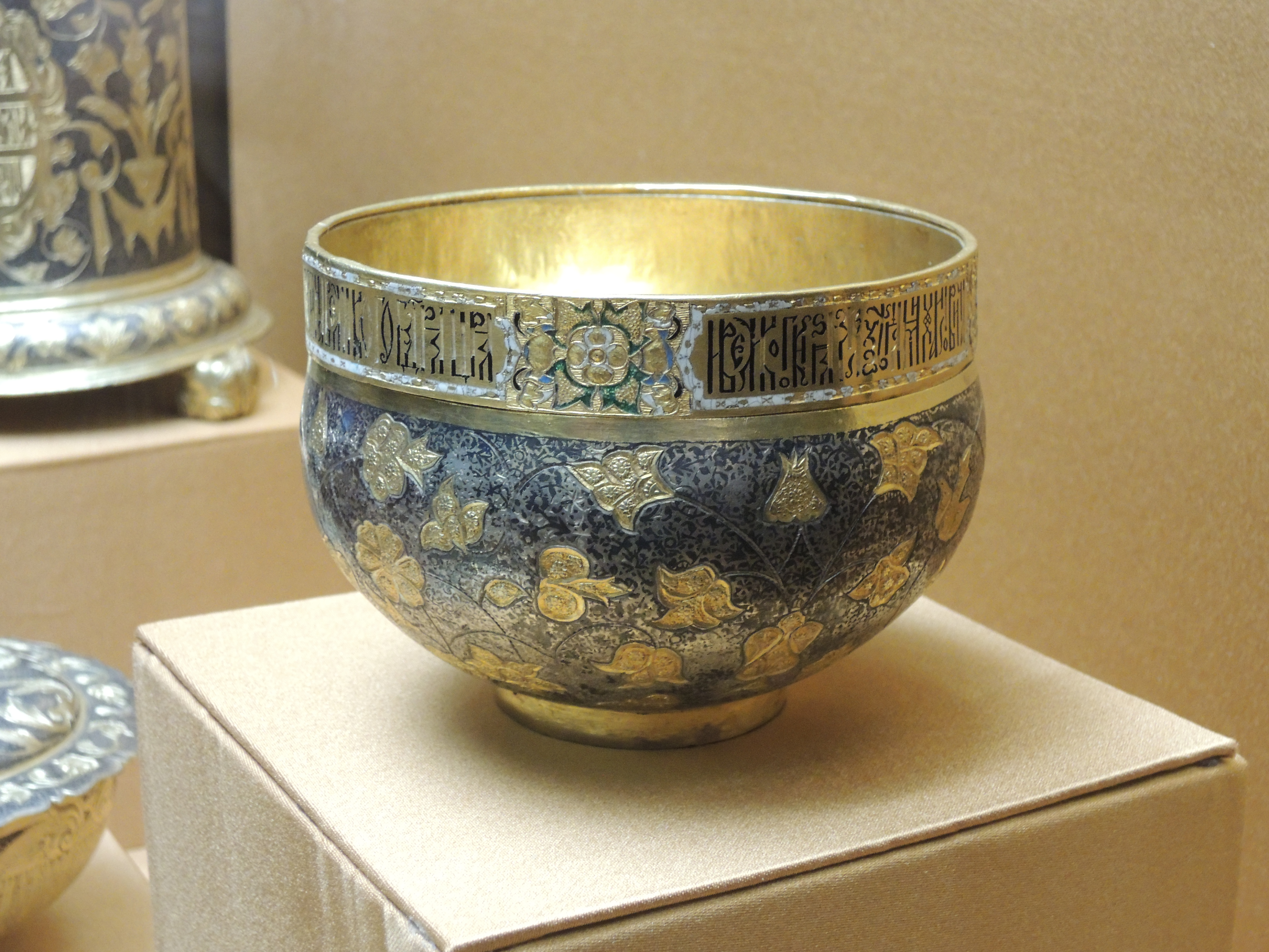 Братина царя Алексея Михайловича. Москва, мастерские Кремля, третья четверть XVII в. Серебро, золото. Чеканка, золочение, резьба, чернь, эмаль. Выставка "Романовы. Начало династии", приуроченная к 400-летию избрания на царство Михаила Федоровича Государственный Исторический музей, весна 2013 года